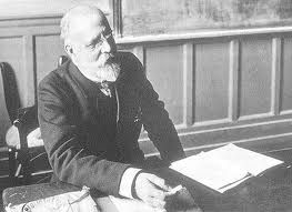 Charles Clermont-Ganneau (1846–1923), orientaliste français